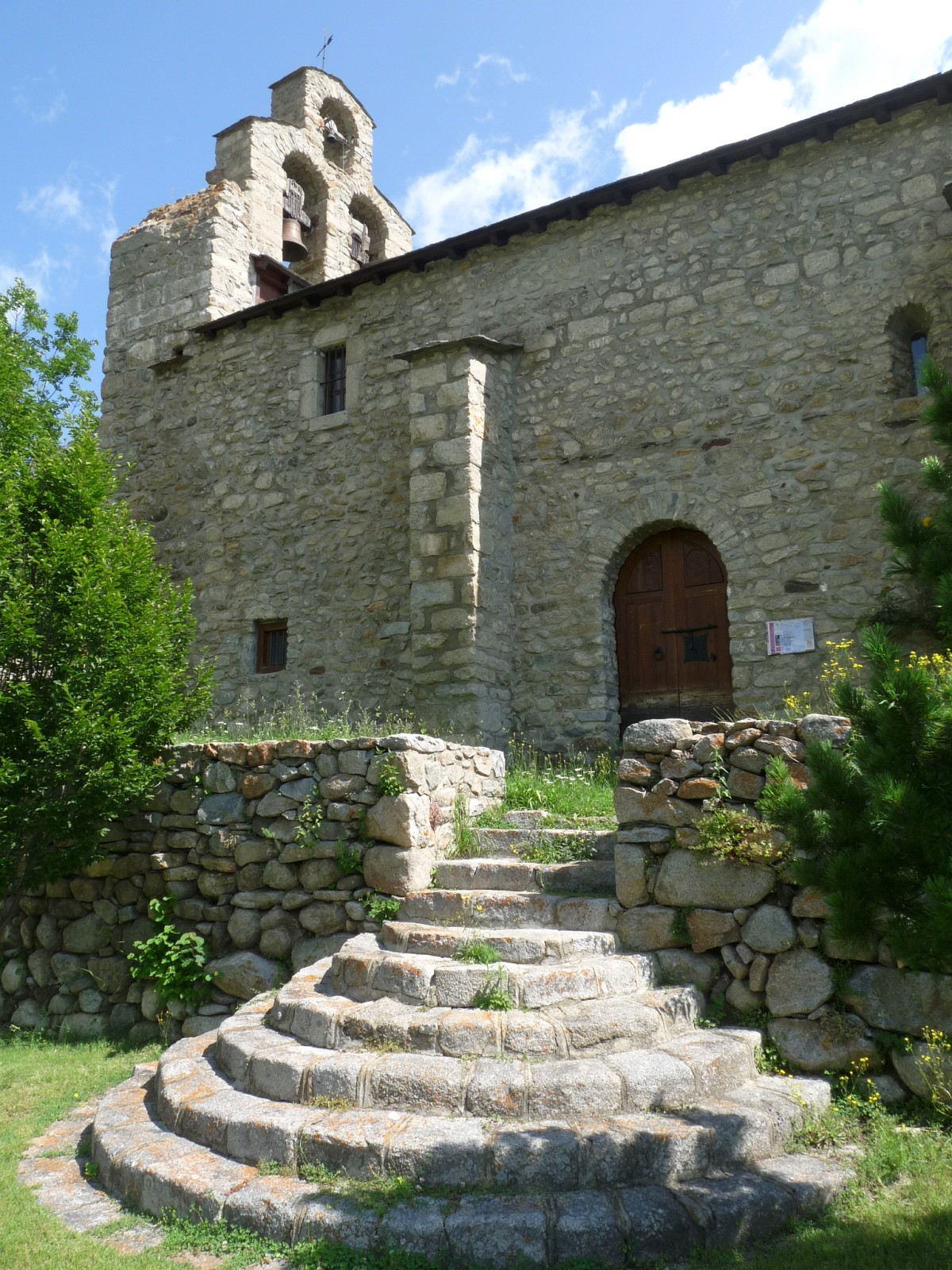 Chapelle de Courbassil, Porta, Pyrénées-Orientales, France